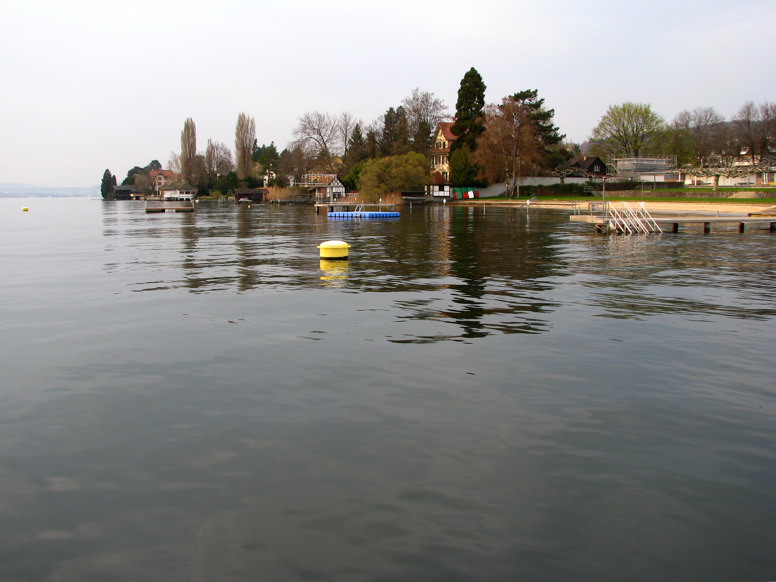 Erlenbach, seen from Zürichsee